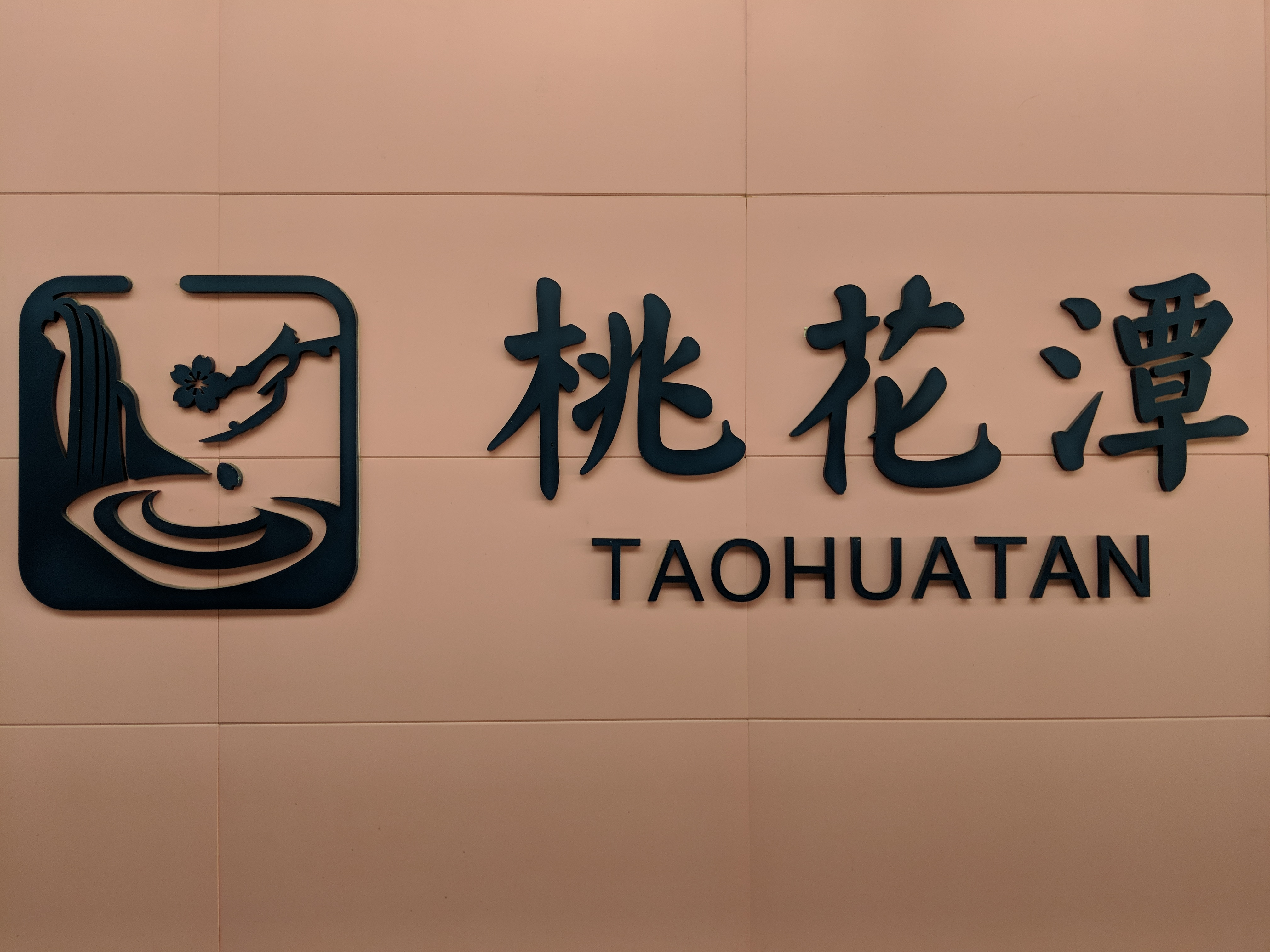 西安地铁3号线桃花潭站大字壁